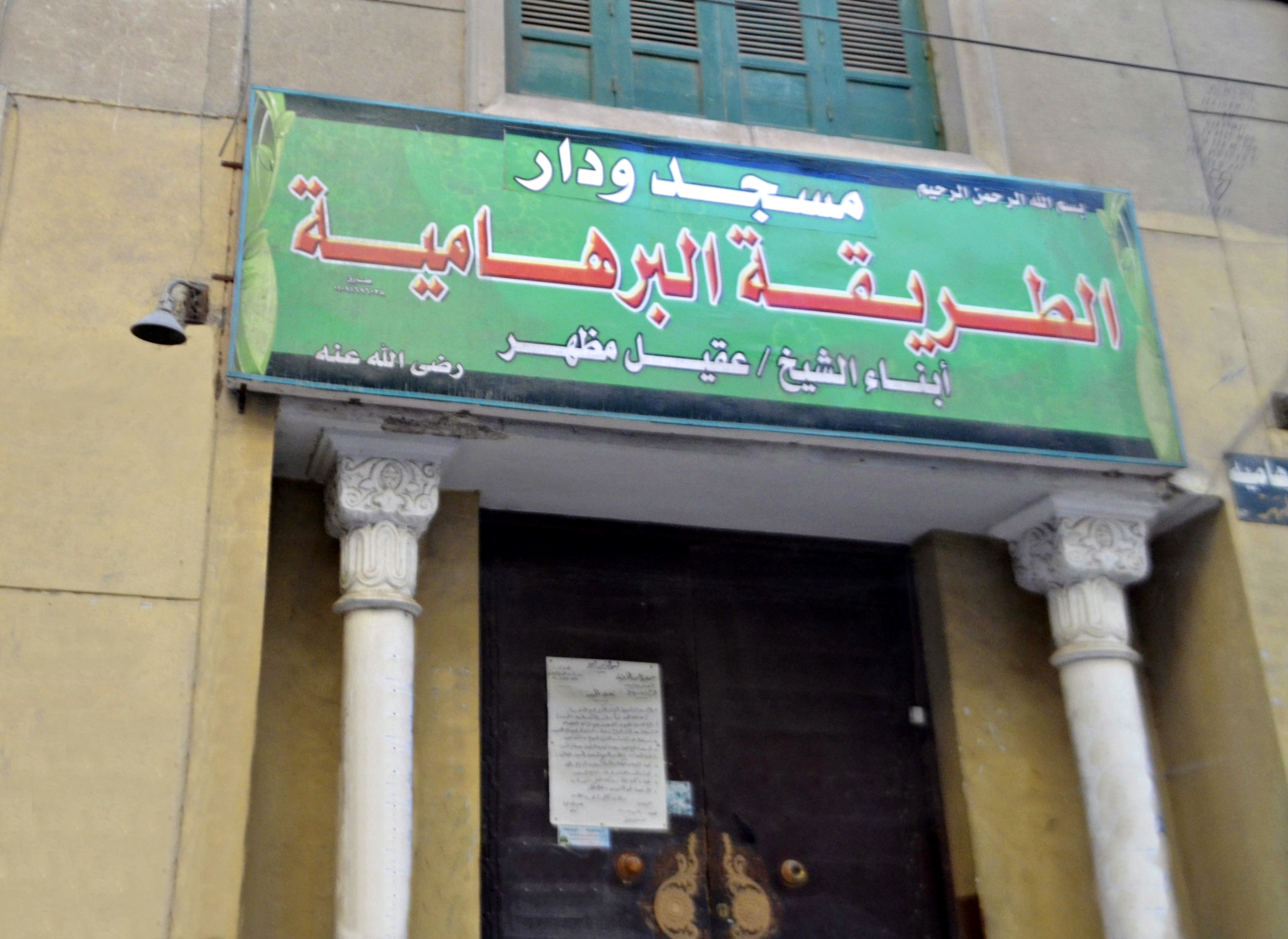 مسجد ودار الطريقة البرهامية بدسوق، مصر